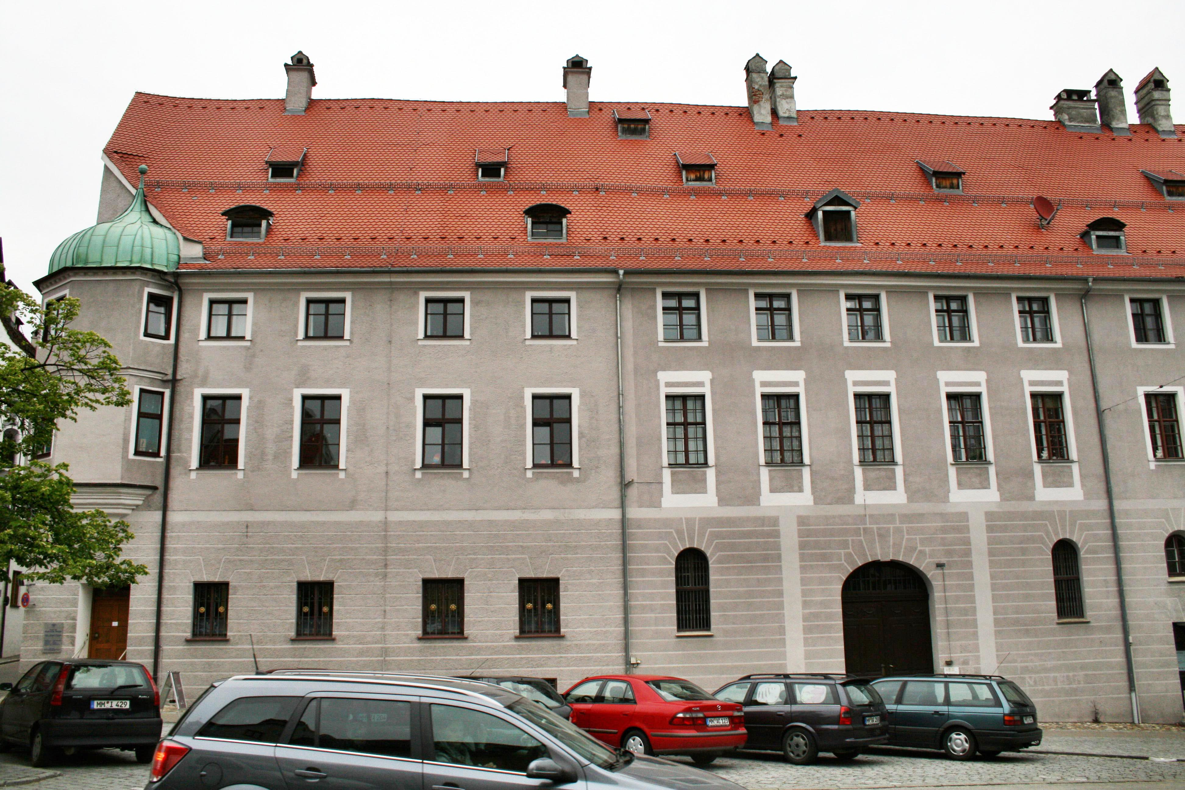 Der Fuggerbau - eines der bedeutendsten Renaissancehäuser in Memmingen